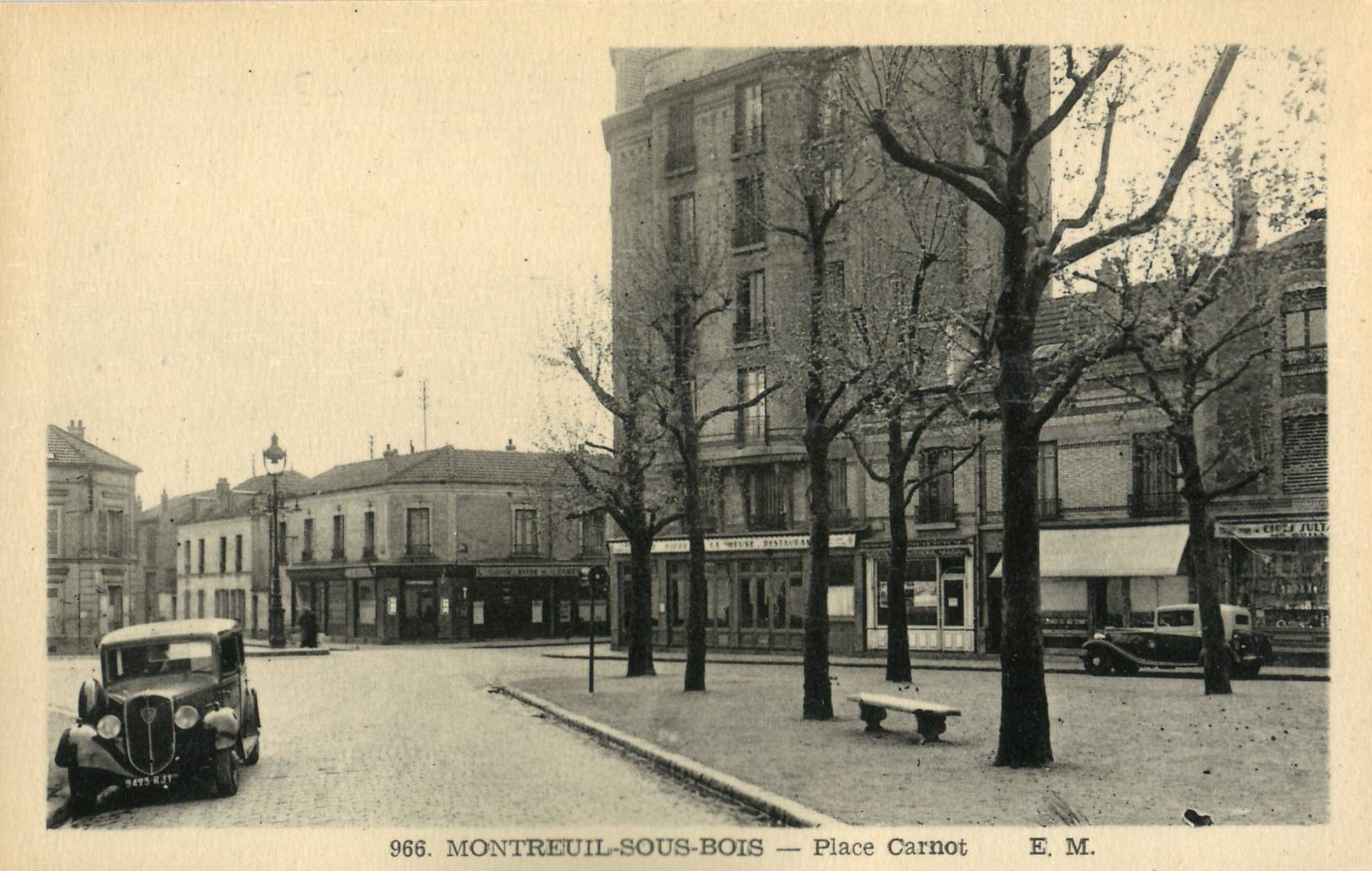 Carte postale ancienne éditée par EM, n°866 : MONTREUIL - Place Carnot